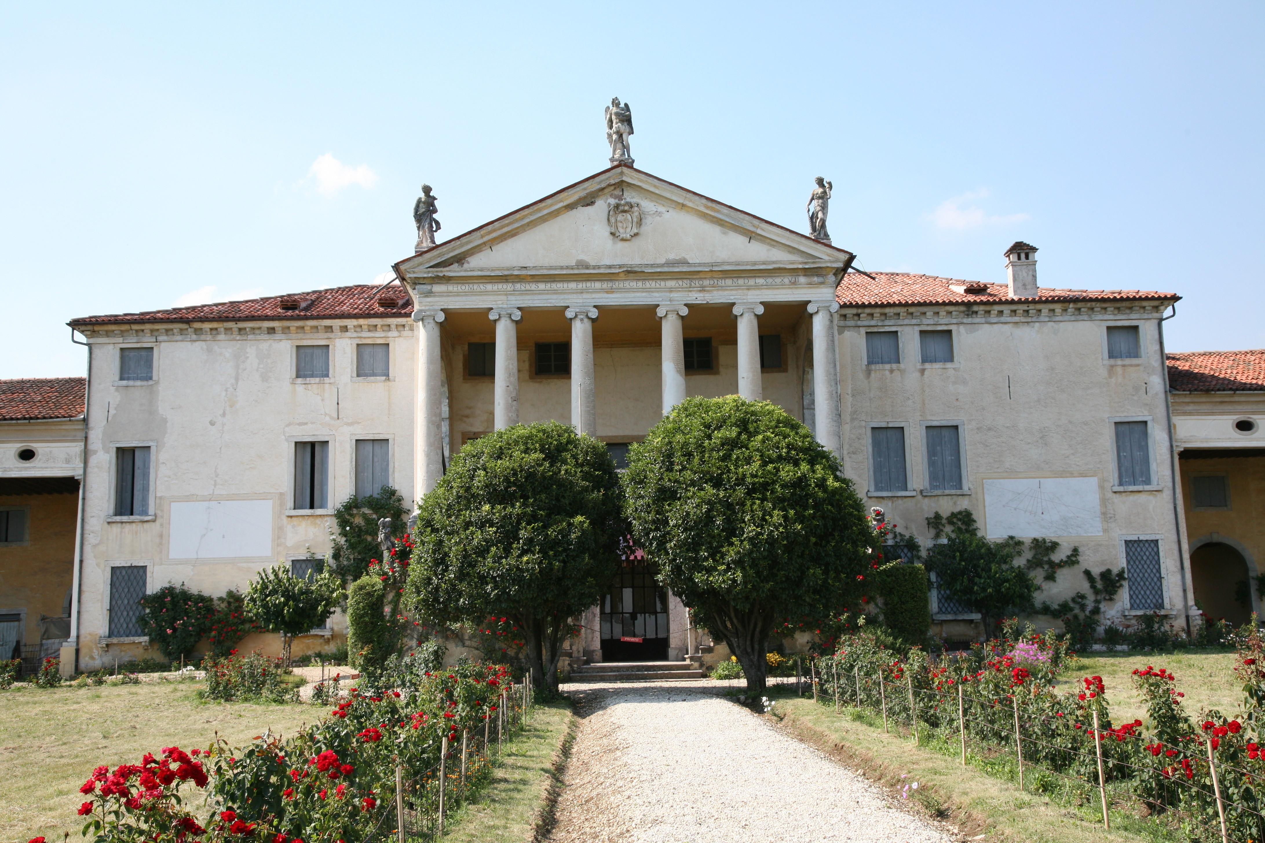 Villa Piovene at Lonedo di Lugo Vicentino